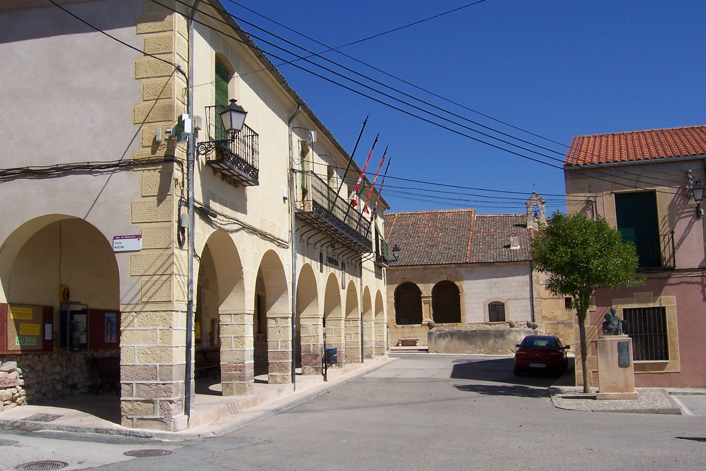 Muñoveros es un pueblo de España, en la provincia de Segovia, comunidad autónoma de Castilla y León. Casa Consistorial.